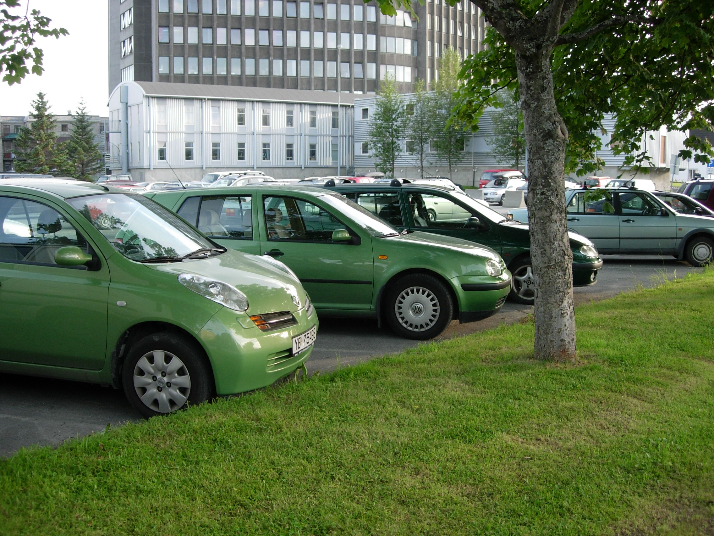 Green cars parked